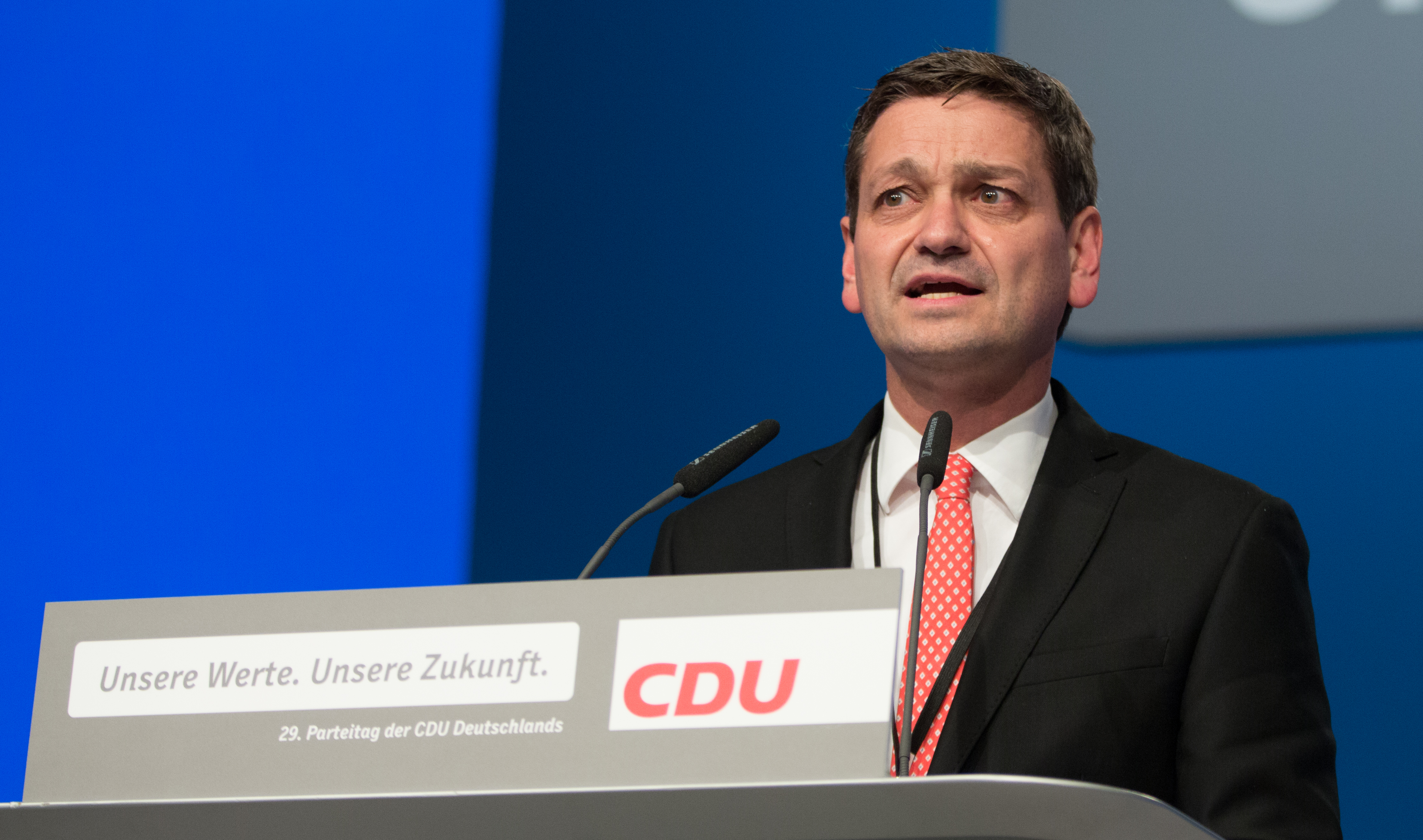 Christian Baldauf, Stellv. Fraktionsvorsitzender der CDU-Landtagsfraktion Rheinland-Pfalz und Mitglied des CDU Bundesvorstandes dem 29. Parteitag der CDU Deutschlands am 6. Dezember 2016 in Essen, Grugahalle